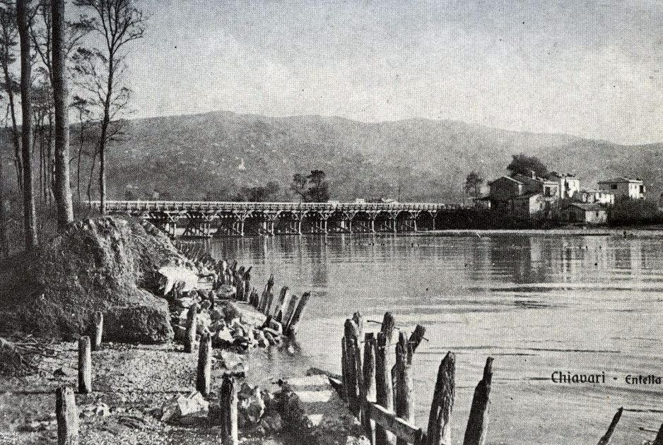 Il fiume Entella e il ponte ferroviario in legno, Chiavari, Liguria, Italia